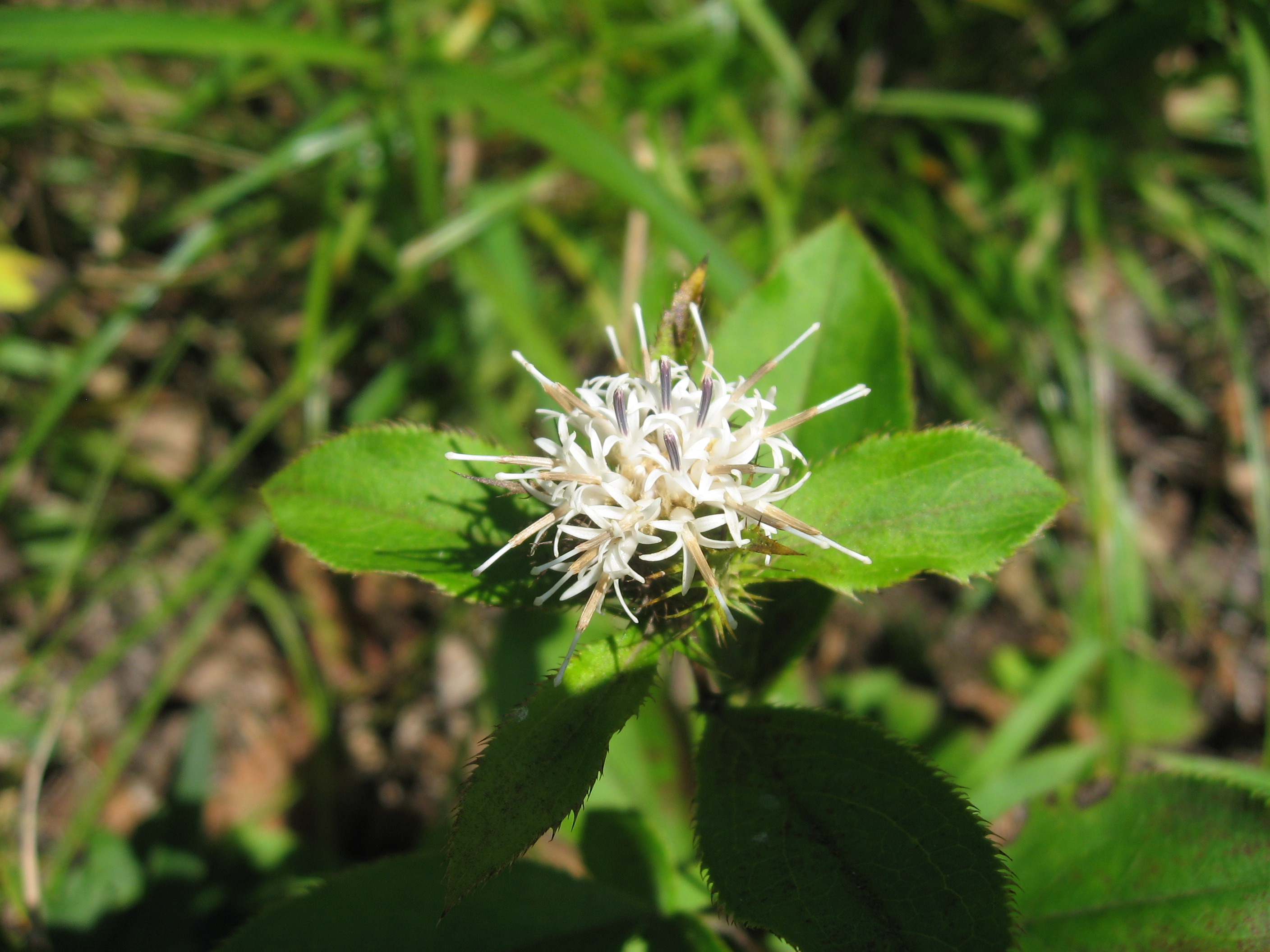 オケラ Atractylodes japonica